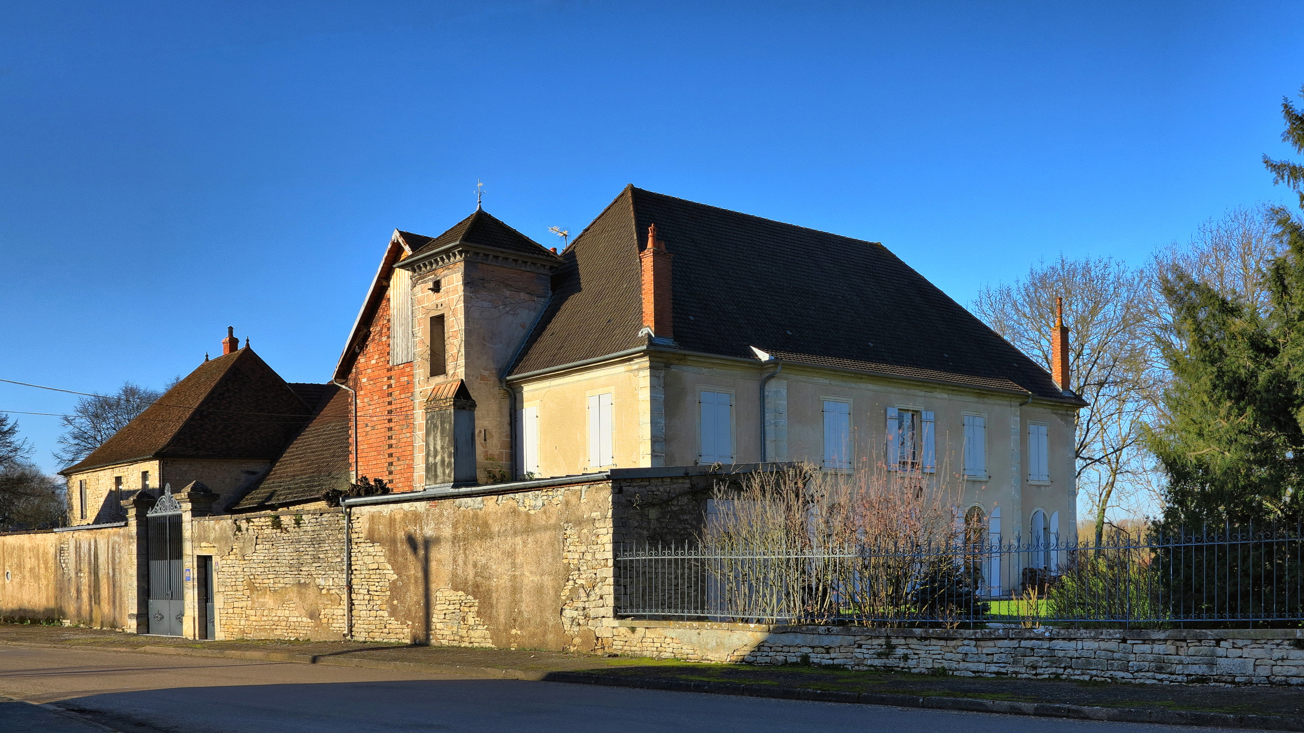 Château de Cult